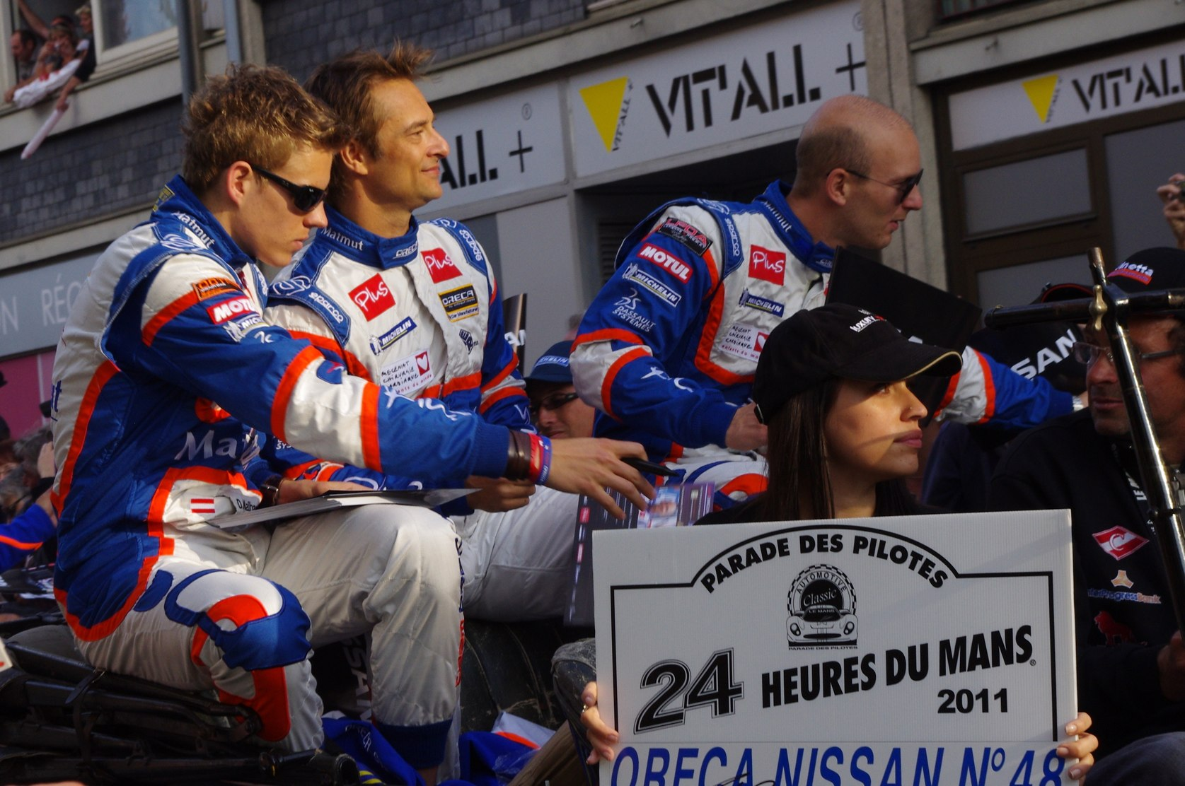 Le Mans 24 Hours 2011 Drivers' Parade